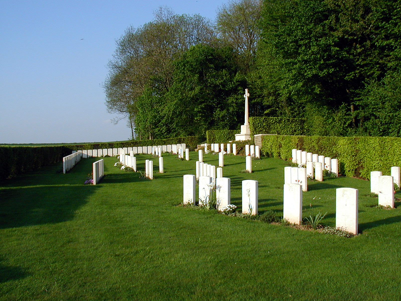 Bazentin (Somme, Picardie, France)